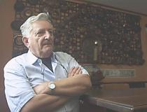 Antonio Pasquali en casa, 2007.